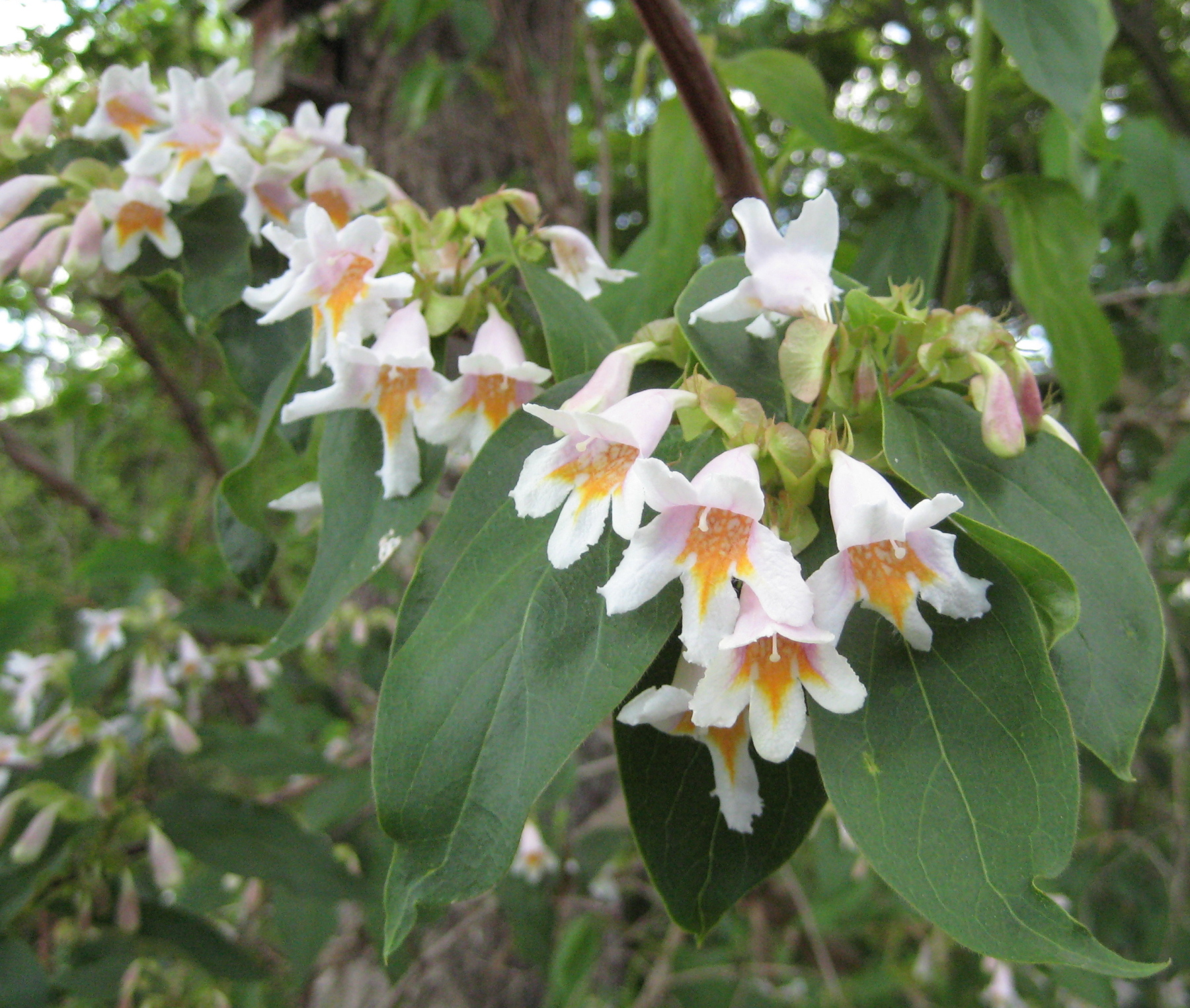 Dipelta floribunda im Botanischen Garten Dresden